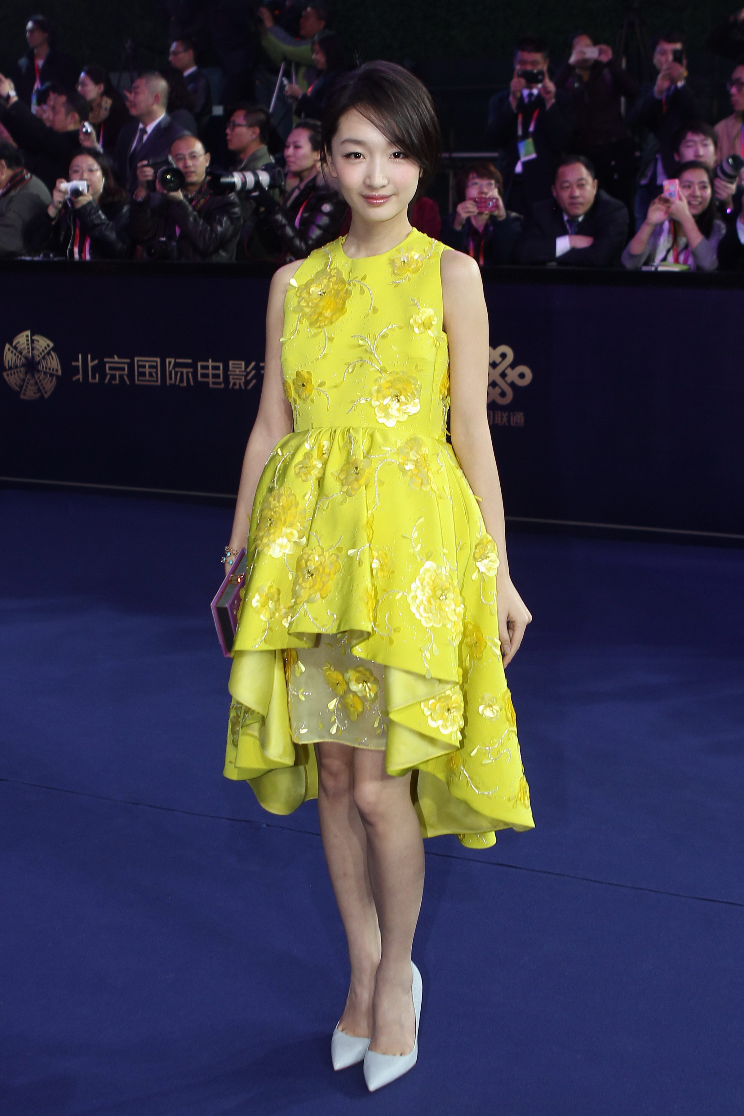 北京时间2013年4月23日晚，周冬雨在北京国际电影节闭幕式上